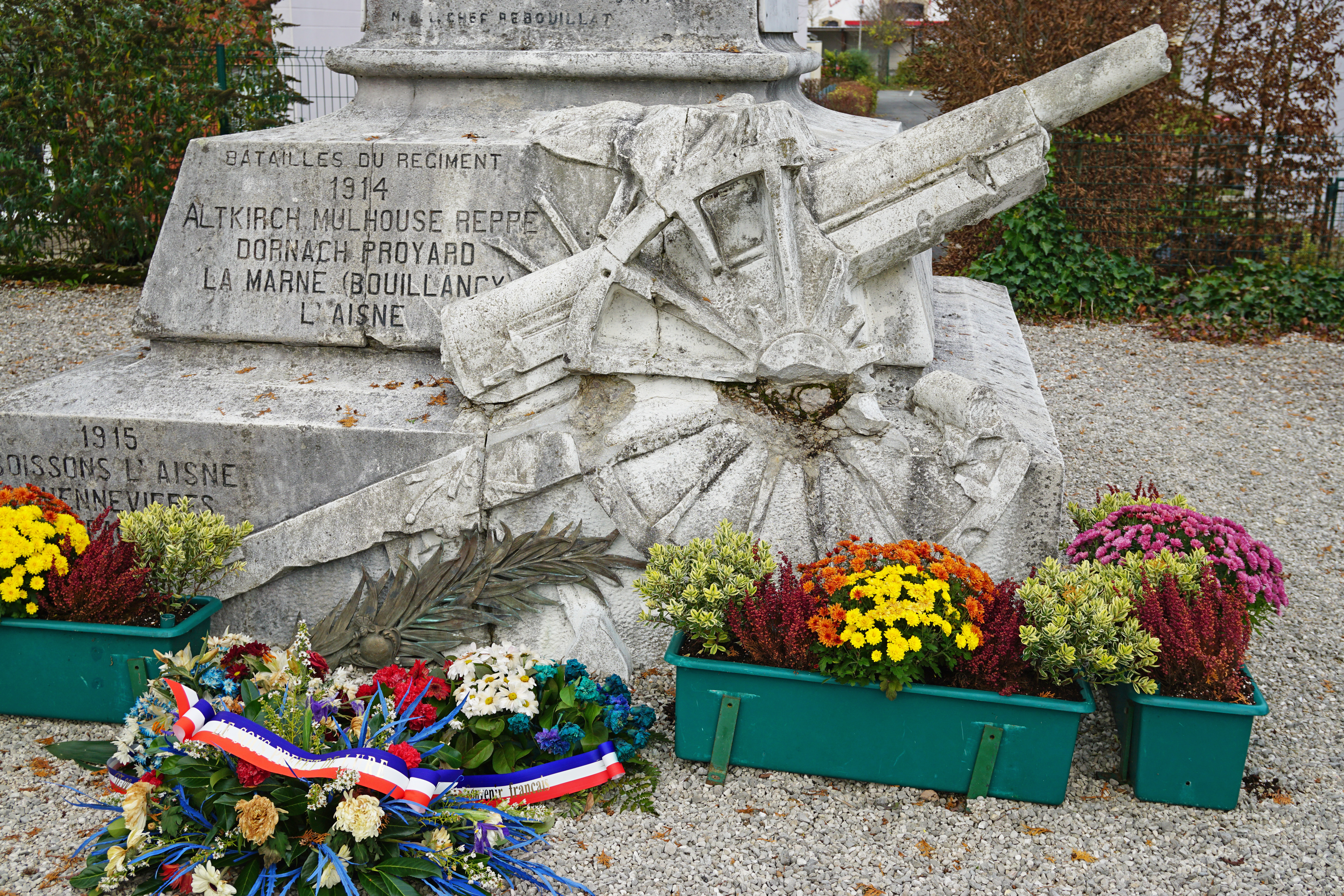 Le monument aux morts du 47e régiment d'artillerie à Héricourt en Haute-Saône.